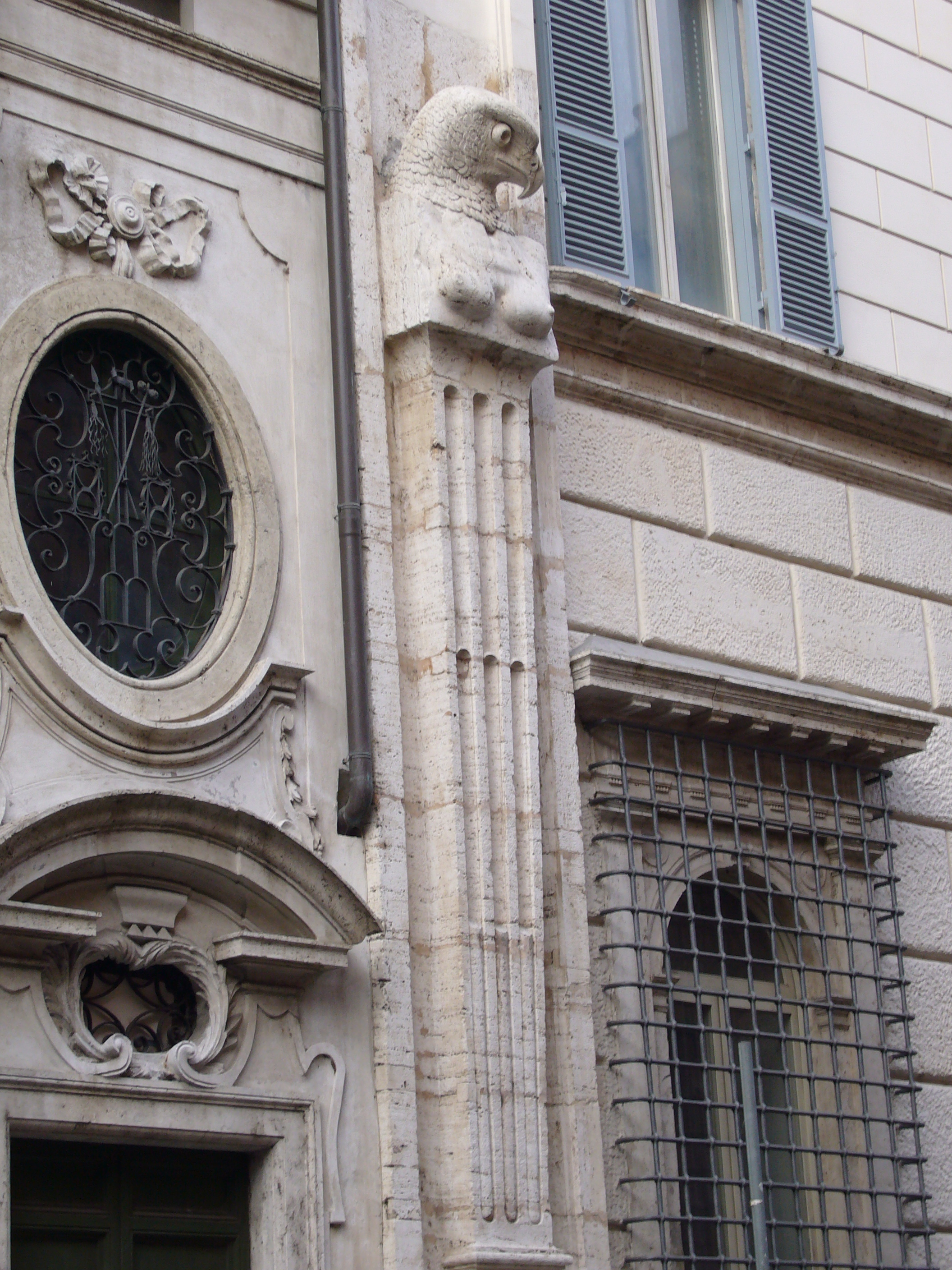 Roma, via Giulia: palazzo Falconieri, erma borrominiana